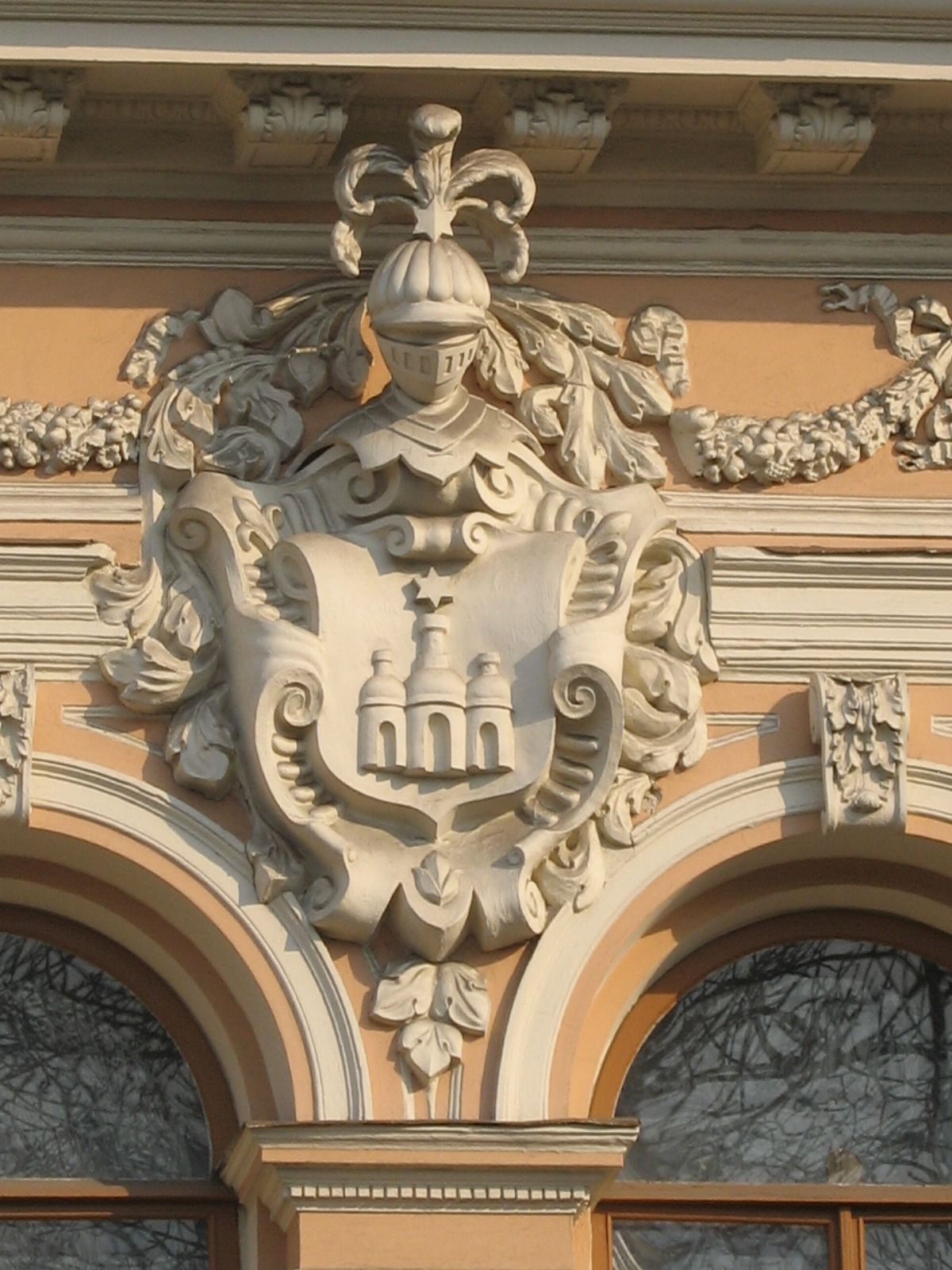 Будинок першого приватного музею Богдана і Варвари Ханенків (Особняк Ханенків (Музей західного та східного мистецтва імені Богдана і Варвари Ханенків), Київ, Терещенківська вул., 15